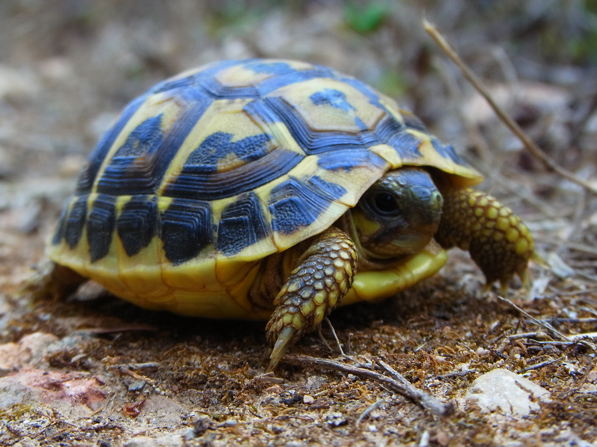 Junge Griechische Landschildkröte (Testudo hermanni boettgeri) auf Menorca